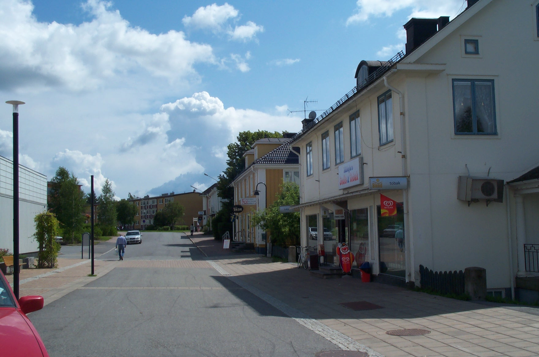 Bilden är tagen i Hällefors (Schillingvägen, vy mot Bergslagsvägen) sommaren 2004 av Johanna Sving